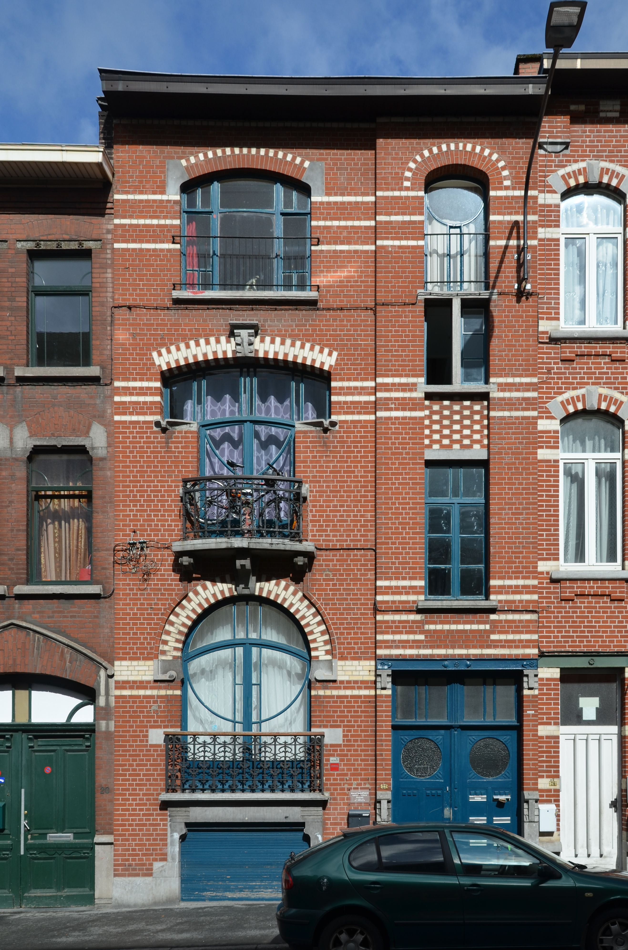 Charleroi (Belgique) - Maison Art nouveau située rue Zénobe Gramme n° 22. Construite par l'architecte Octave Carpet en 1909 pour Ad(olphe ?) Lequy.